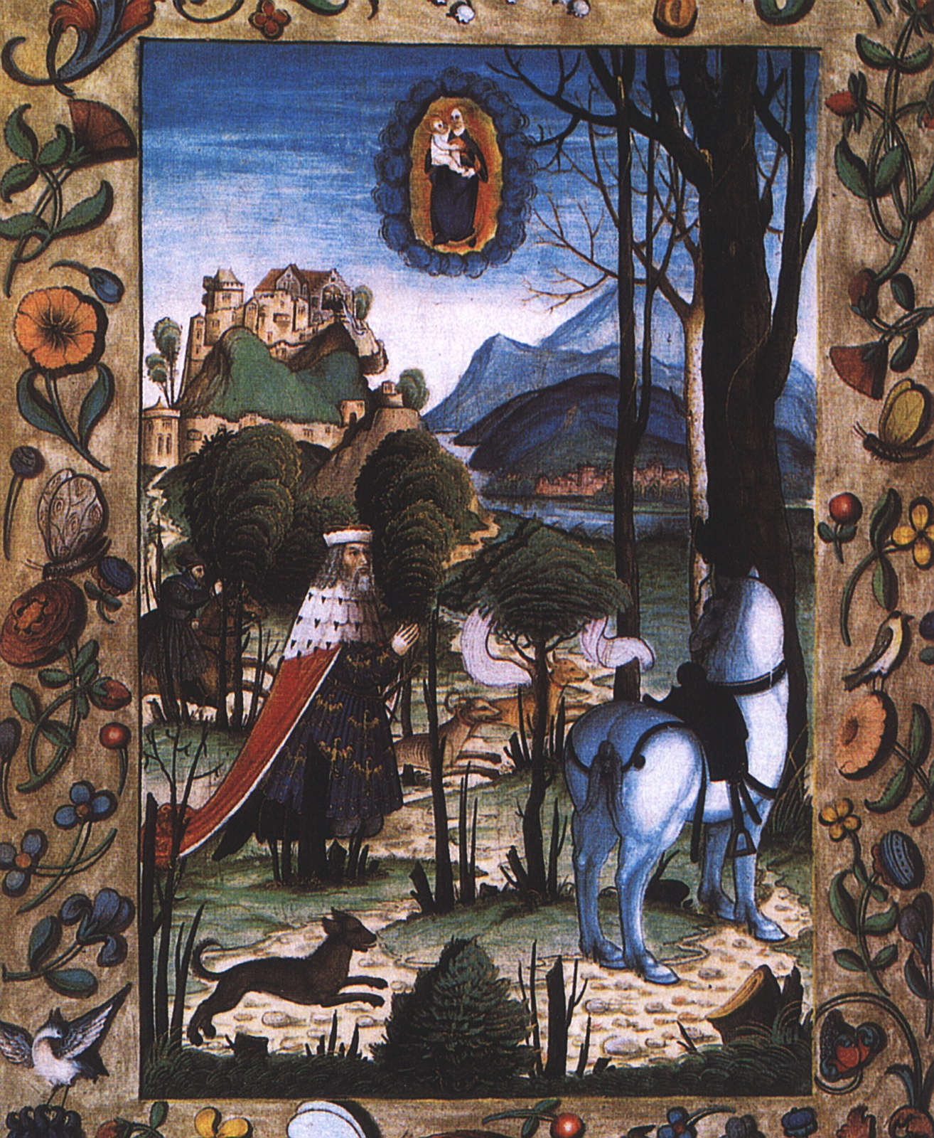 Gründungslegende von Klosterneuburg, Urbar 16. Jahrhundert